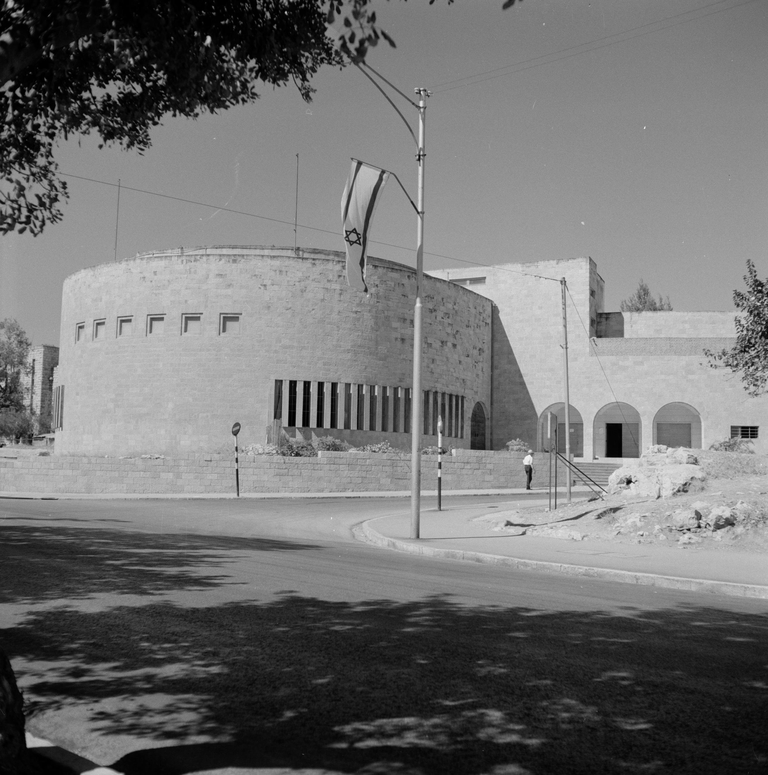 Collectie / Archief : Fotocollectie Van de Poll Reportage / Serie : Israël 1964-1965: Jerusalem (Jeruzalem), straatbeelden Beschrijving : Jeruzalem. De Jessurunsynagoge met op de voorgrond de Israelische vlag Datum : 1964 Locatie : Israël, Jeruzalem Trefwoorden : architectuur, joodse religie, portalen, ramen, straatbeelden, synagogen, vlaggen Fotograaf : Poll, Willem van de, [onbekend] Auteursrechthebbende : Nationaal Archief Materiaalsoort : Negatief (zwart/wit) Nummer archiefinventaris : bekijk toegang 2.24.14.02 Bestanddeelnummer : 255-2255